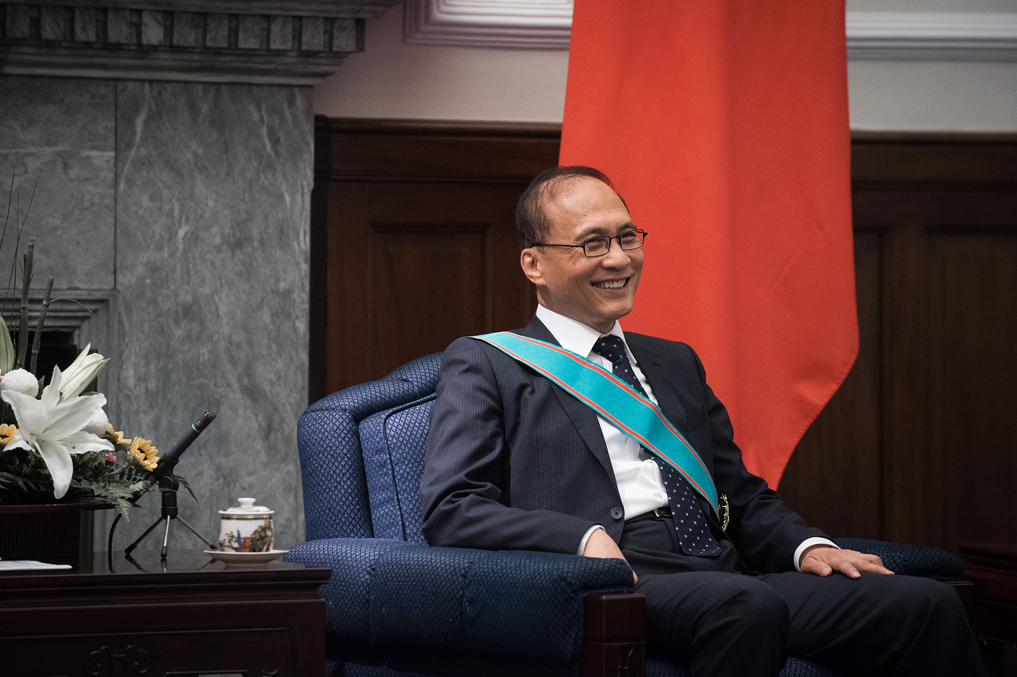 行政院前院長林全